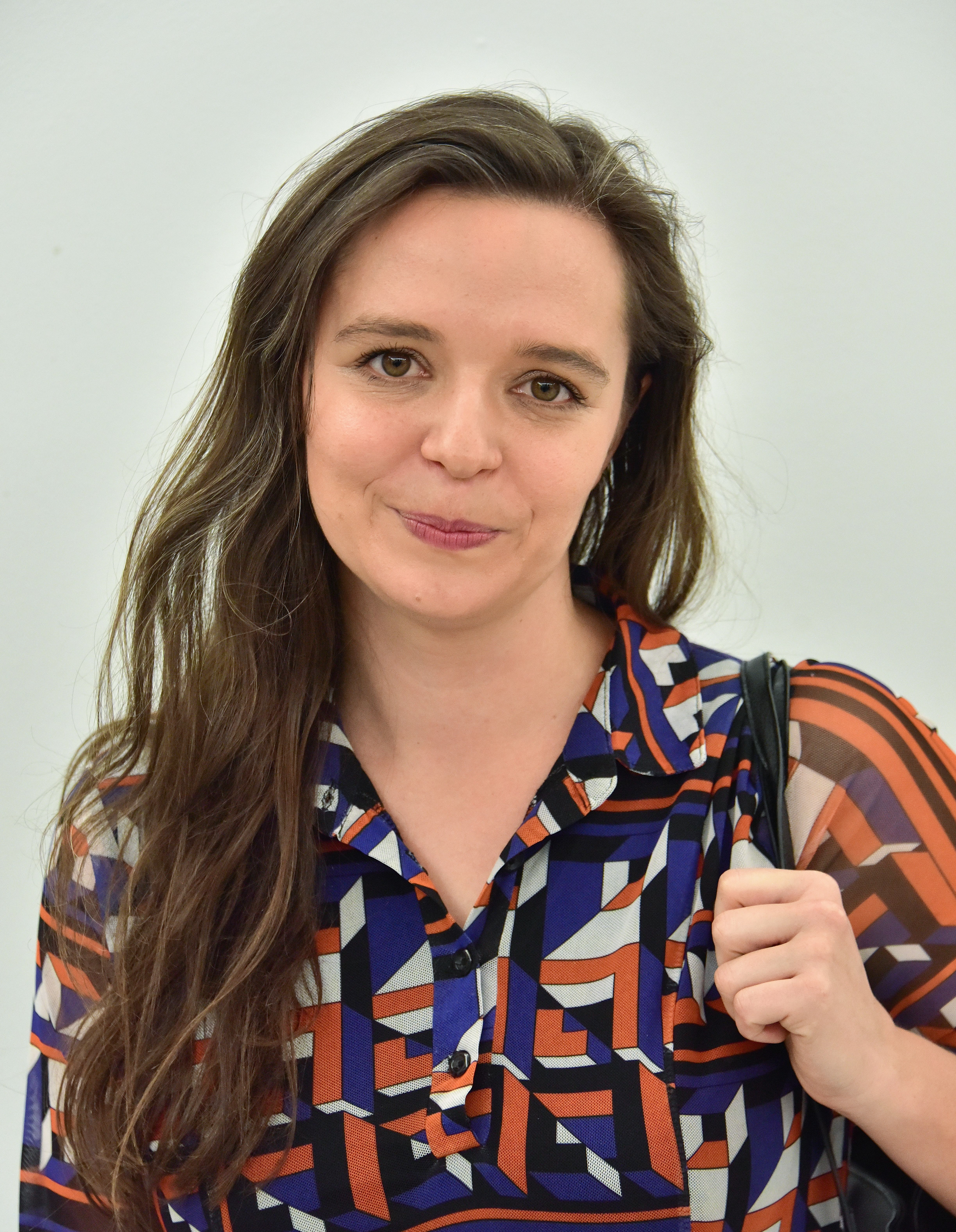 Posłanka Klaudia Jachira w Sejmie